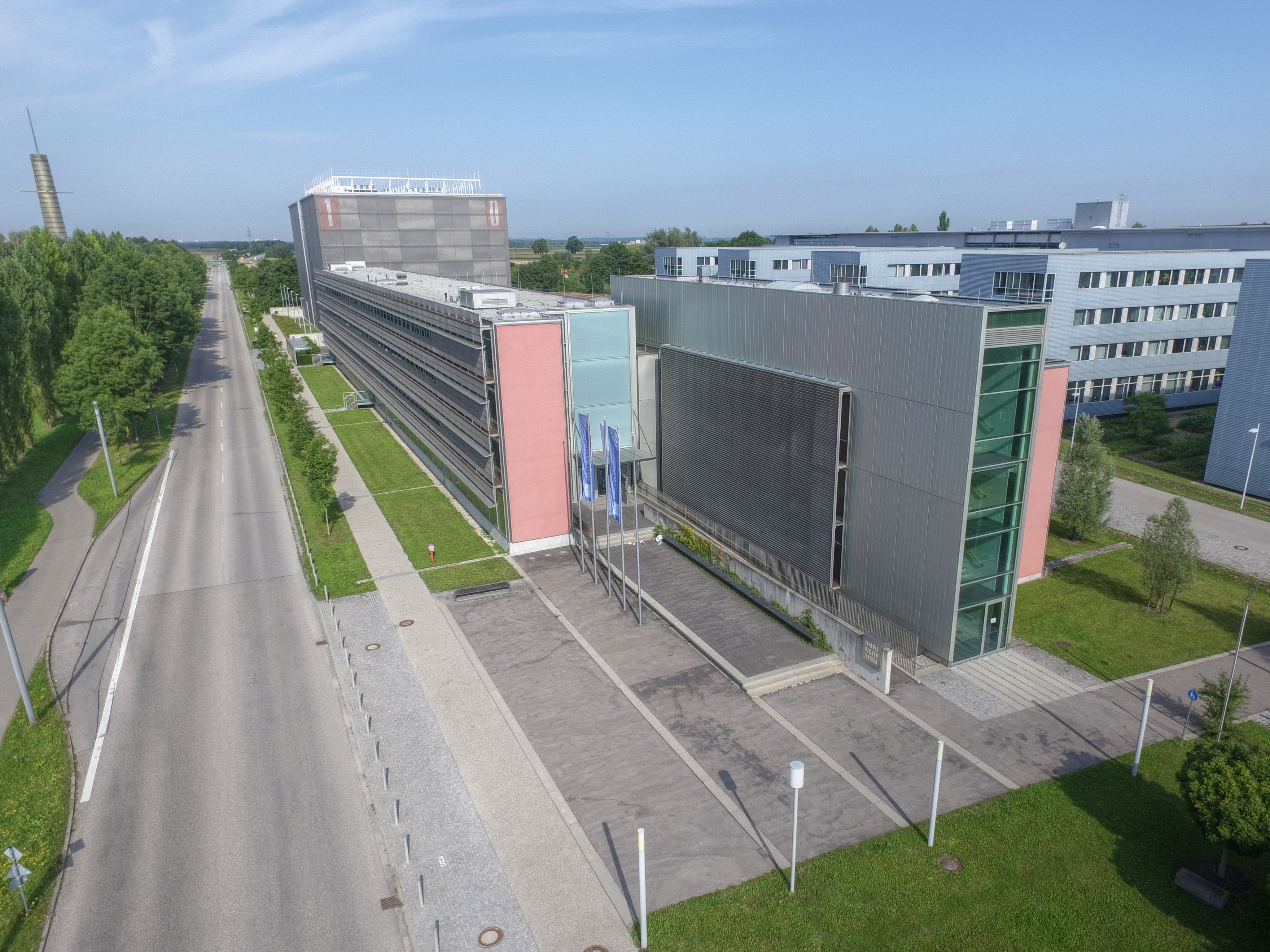 Leibniz Rechenzentrum in Garching, aerial view